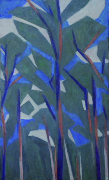 Tableau "Vent d'ouest" par Jean Bouvier